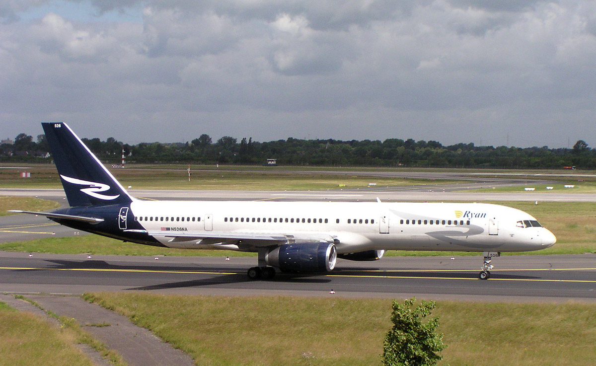 Ryan International Airlines B757-200 N526NA in Düsseldorf (DUS/EDDL)